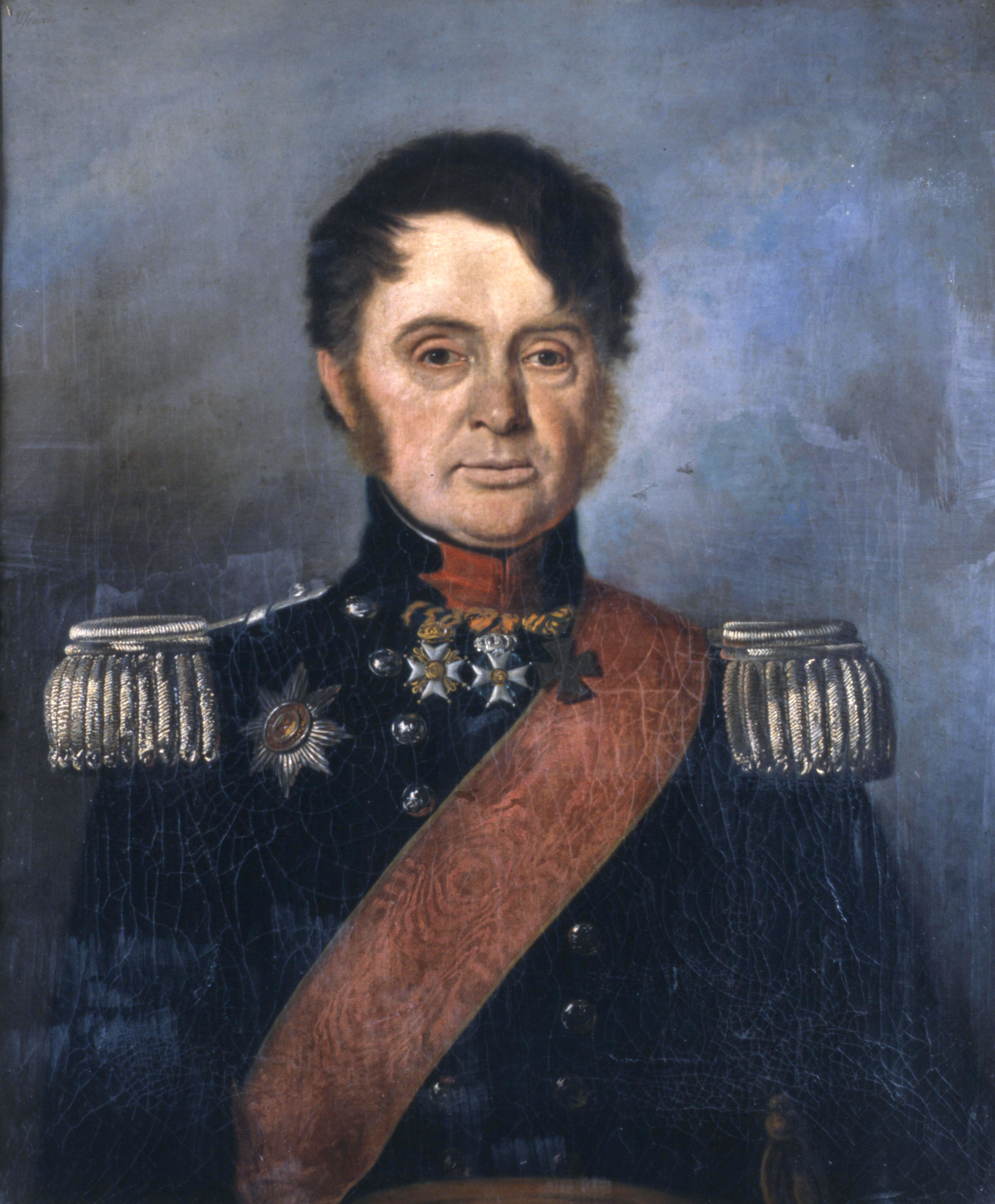 Portret van Johan Daniël Cornelis Carel Willem d'Ablaing van Giessenburg (1779-1859). Gemaakt 1825-1849 door Jan Lodewijk Jonxis.